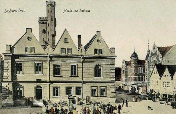 Rathaus Schwiebus about 1900